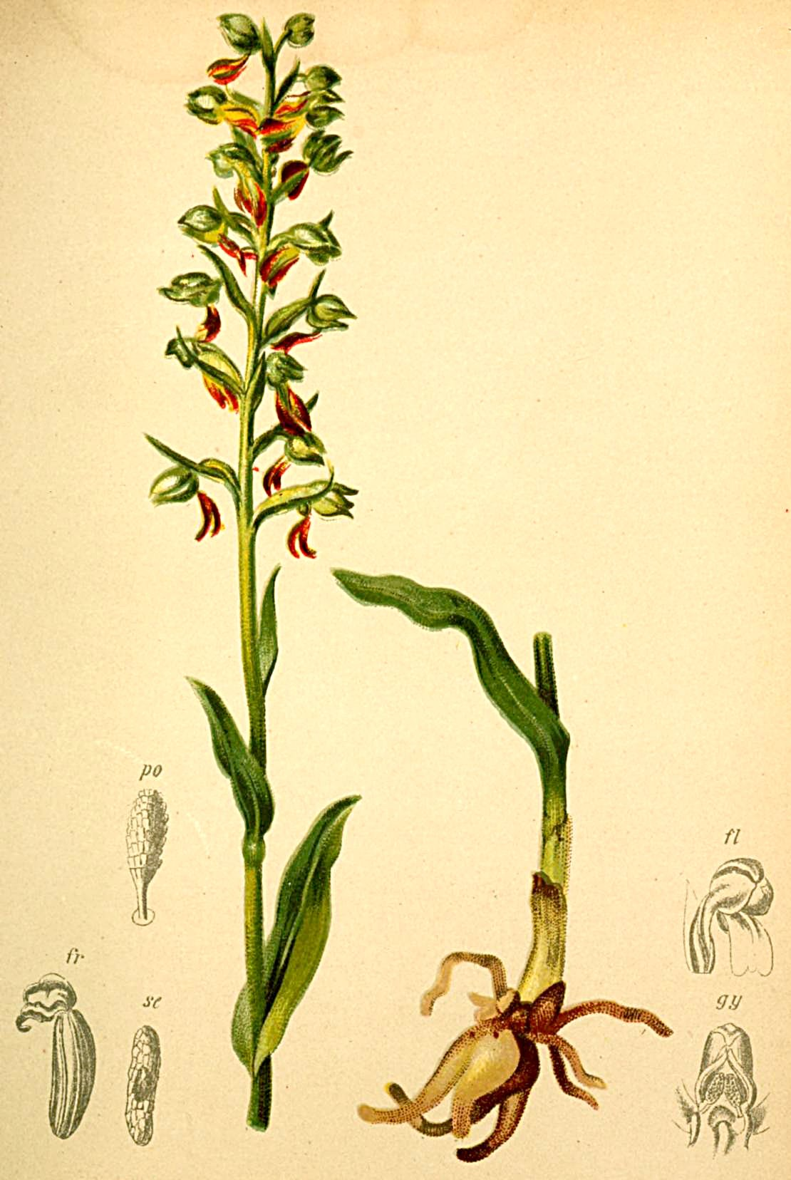 Coeloglossum viride